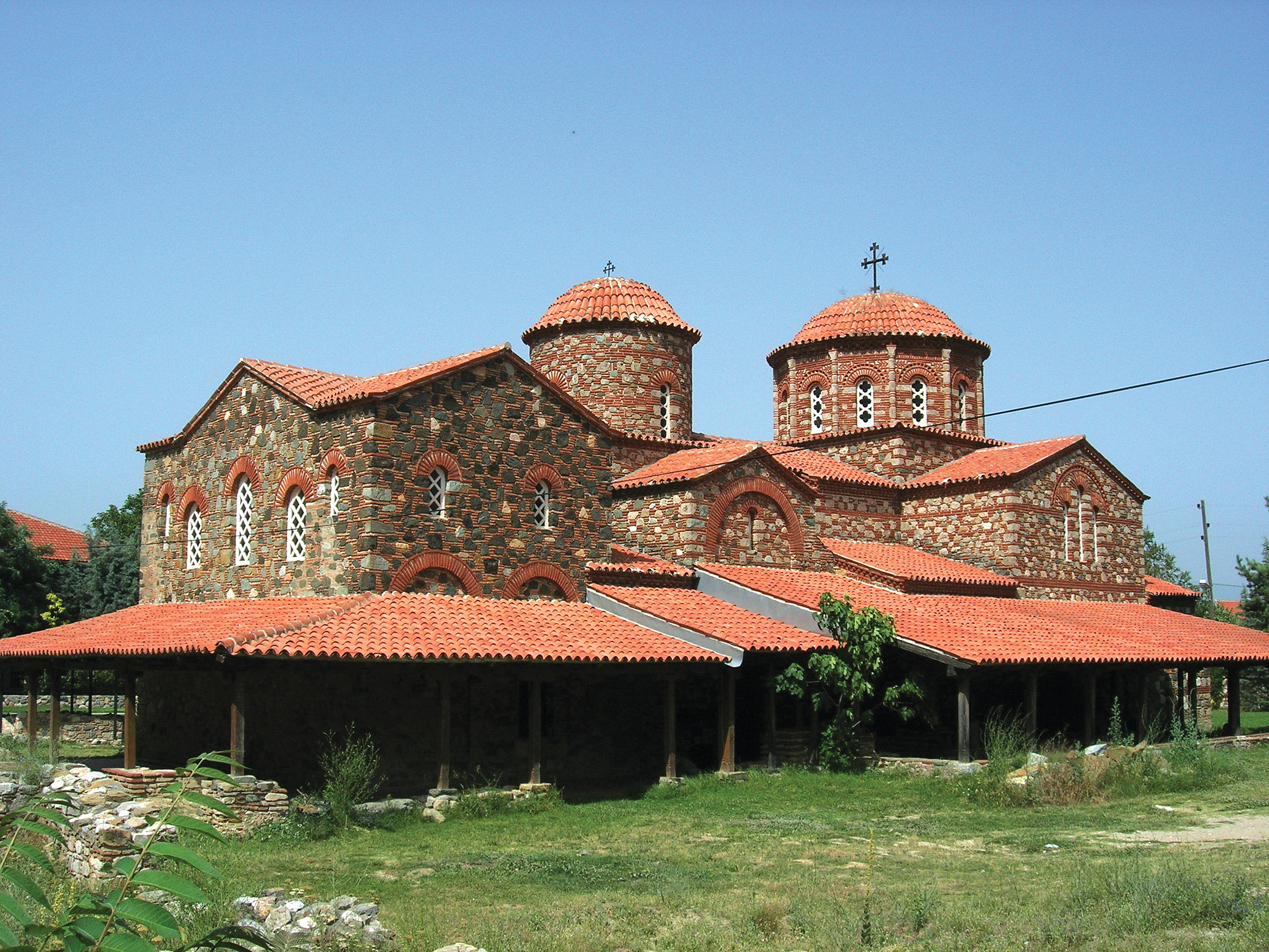 монастырь Водоча